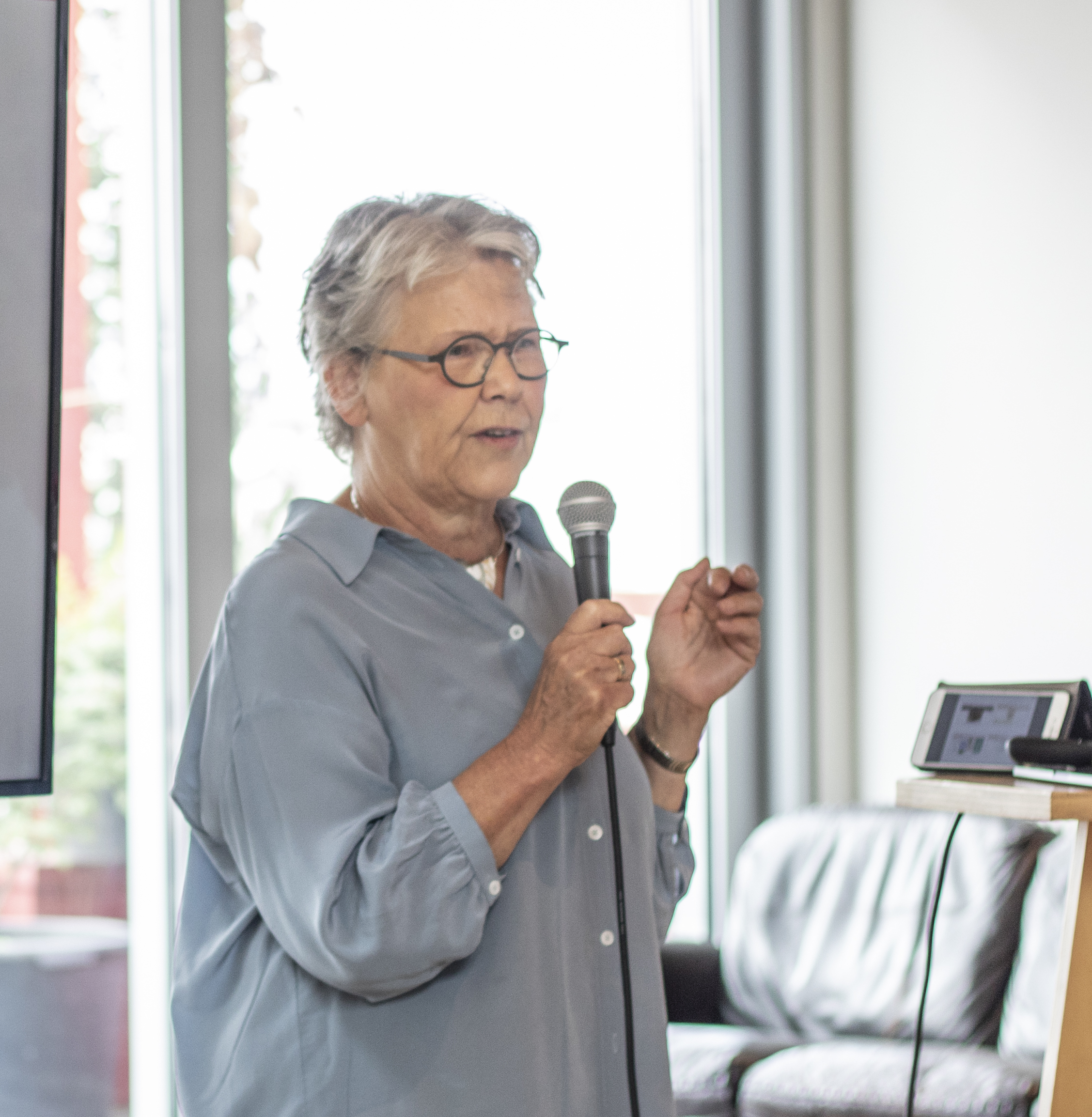 Fotograaf: Menno van Winden